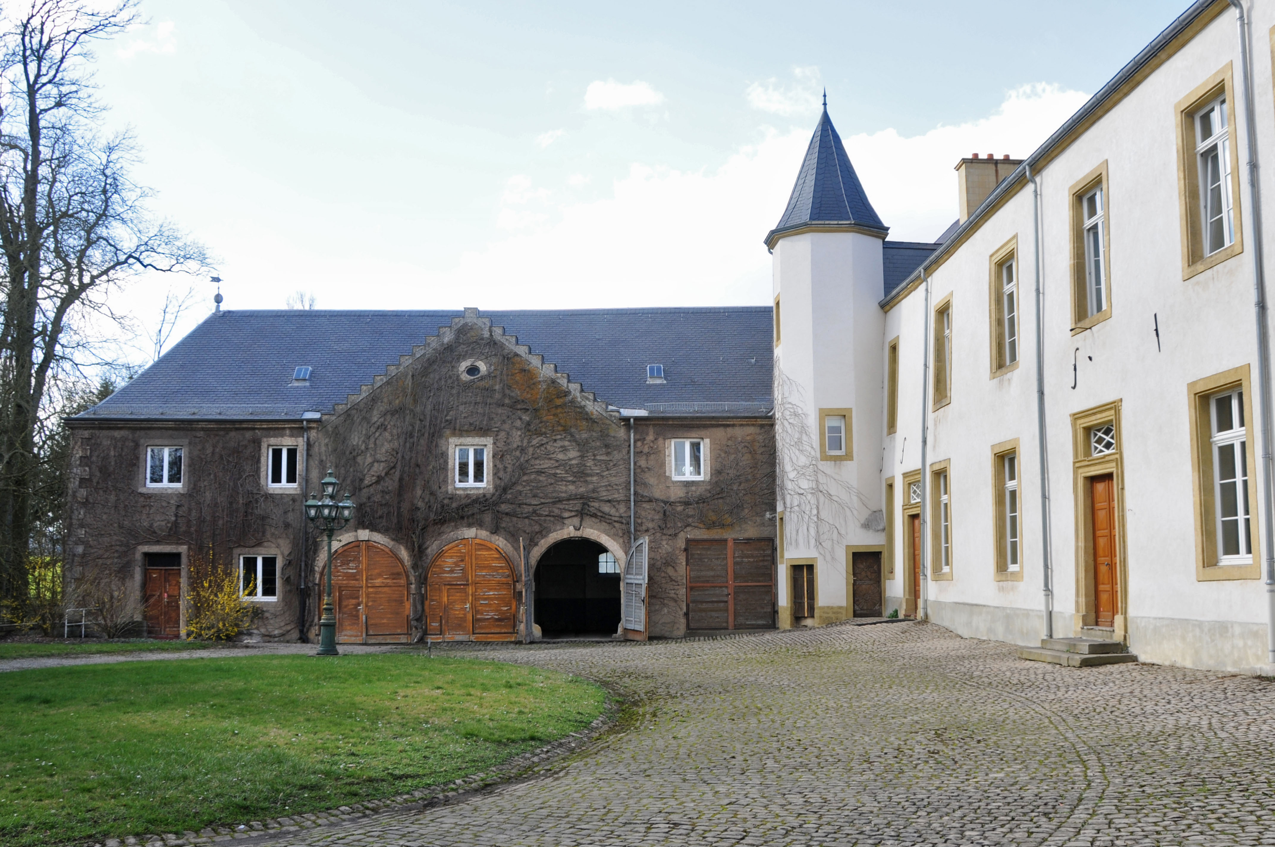 La cour intérieure (partie arrière) du château de Sanem (Luxembourg)